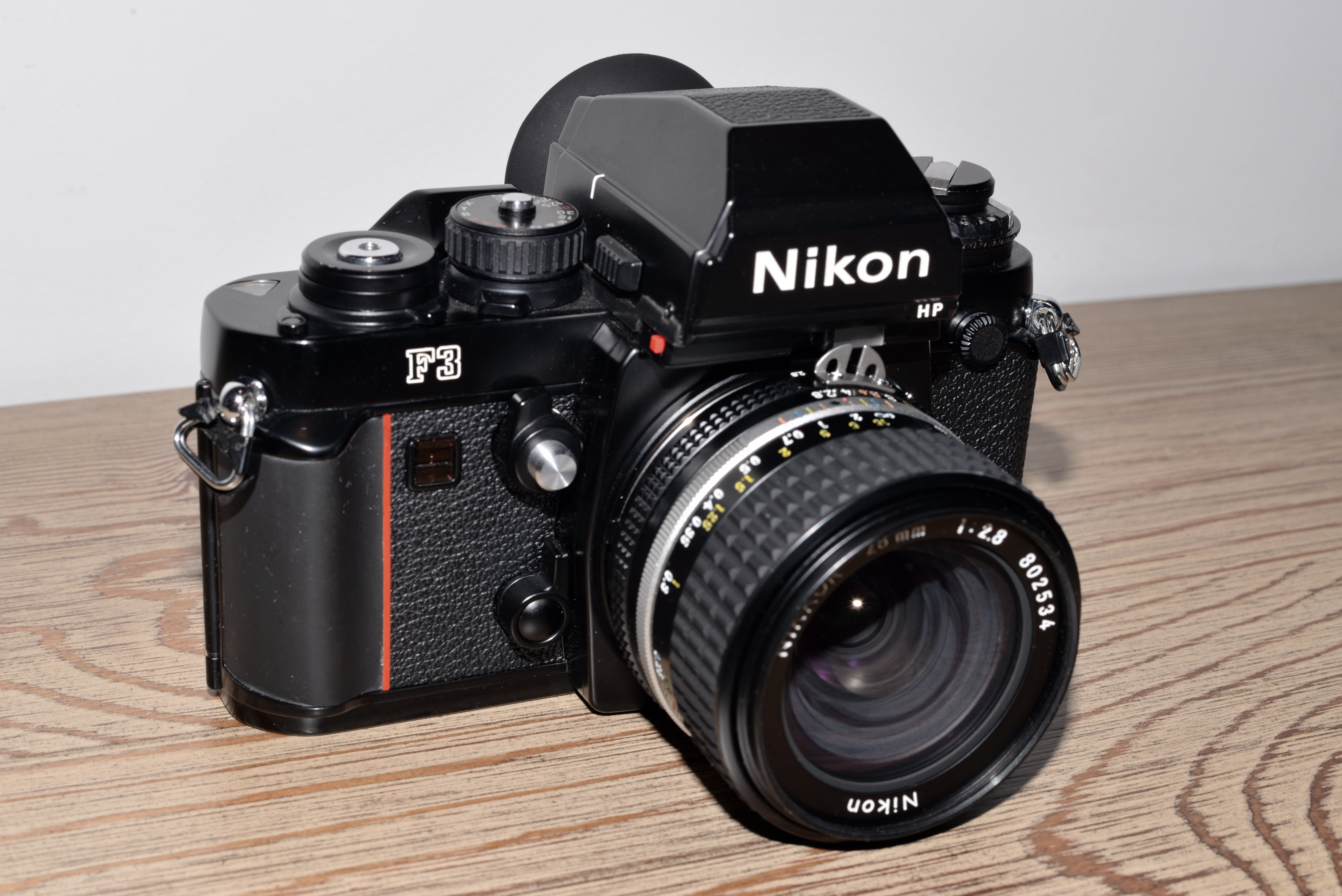 ニコンF3HP一眼レフカメラ レンズは28㎜のAI-s